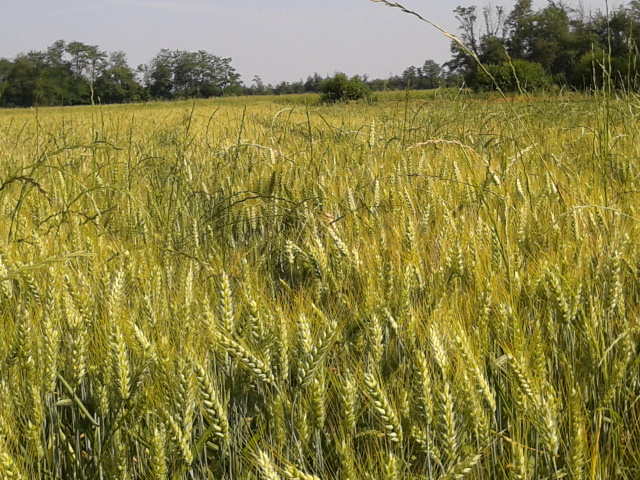 Campi nel Parco del Roccolo nei pressi di Villapia (già Tiracoda), frazione di Parabiago. This is a photo of a monument which is part of cultural heritage of Italy.